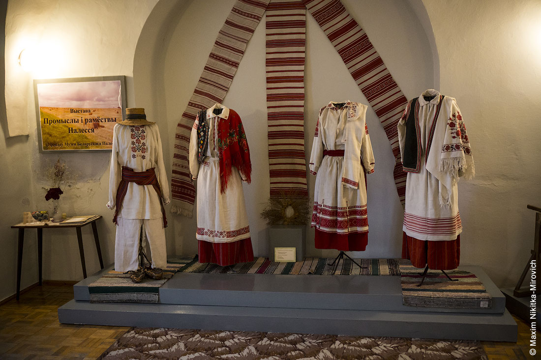 Пінск. Музей Беларускага Палесся. Зала этнаграфіі і побыту Палесся